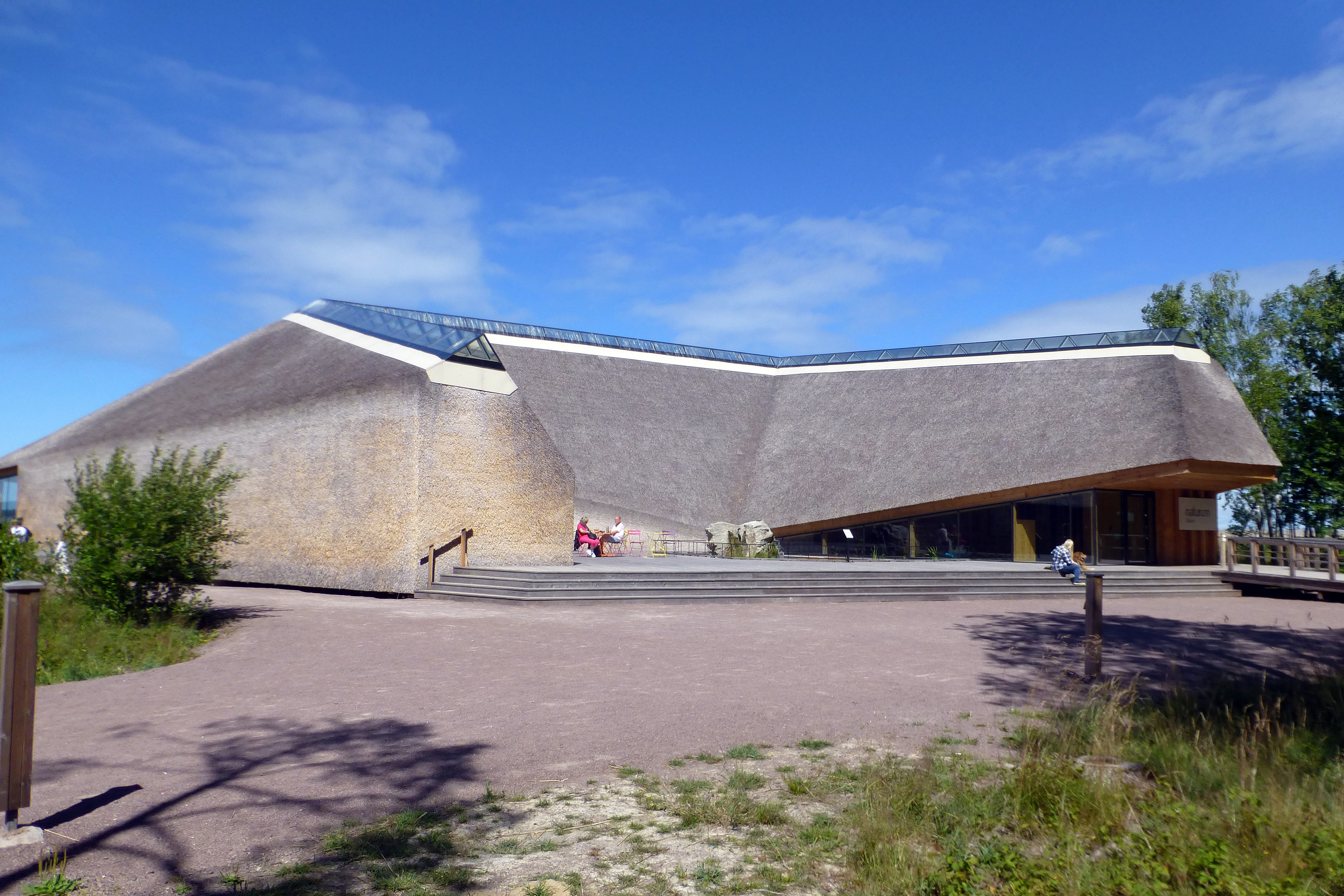 Naturrum Tåkern